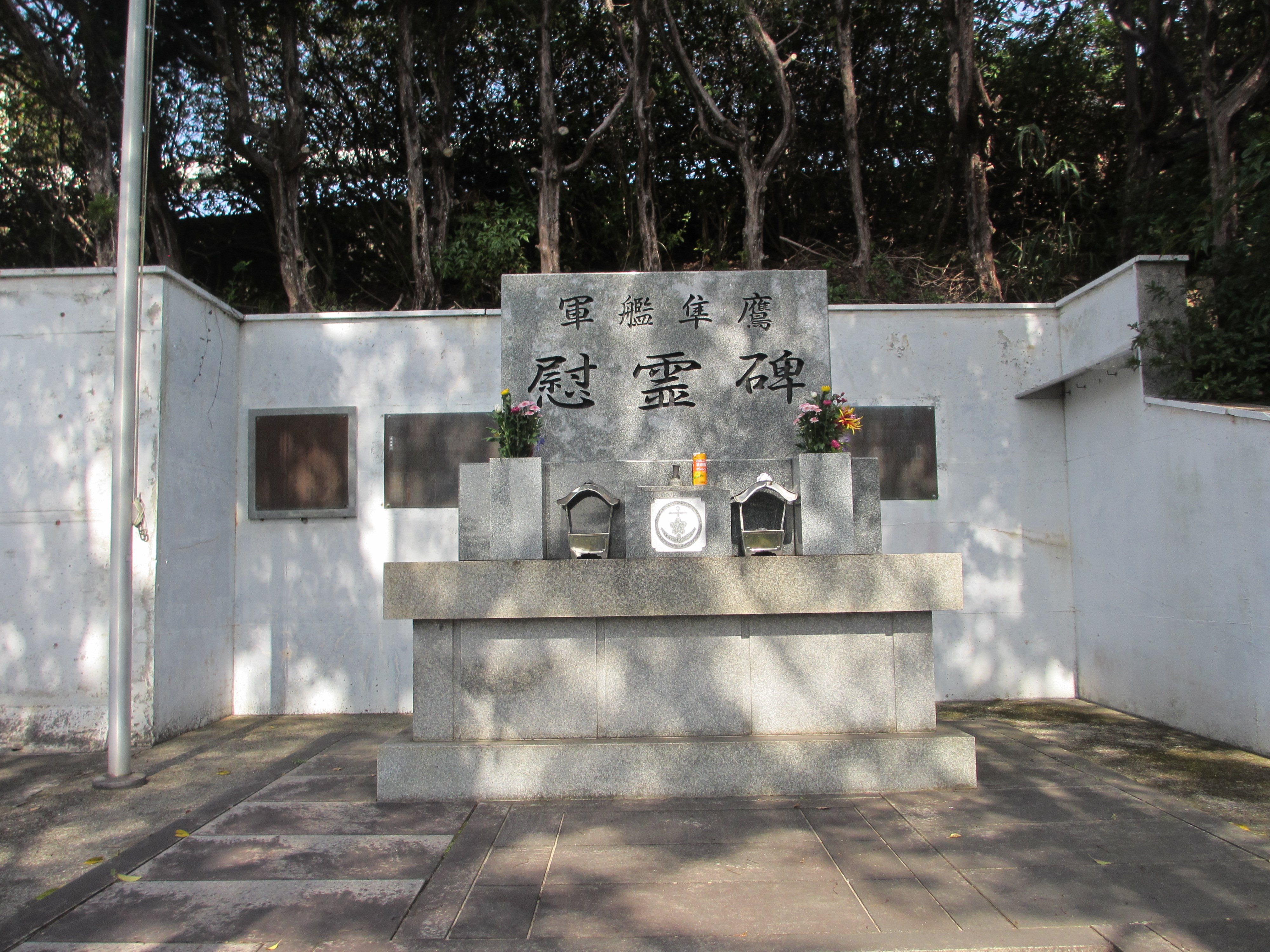 呉市上長迫町旧海軍墓地、大和ミュージアム逆山手